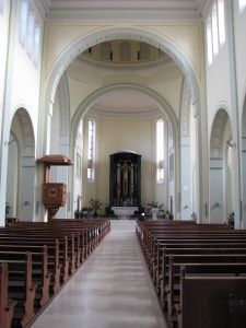 St.-Bonifatius-Kirche in Mannheim